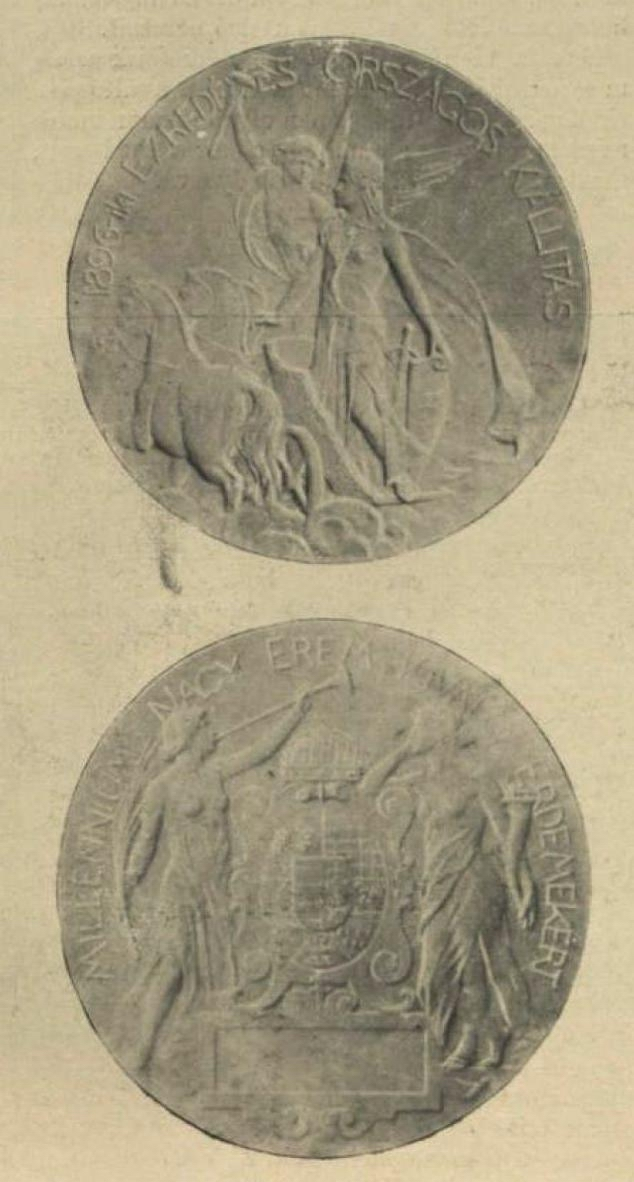 1896-os millenniumi kiállítás nagy érme